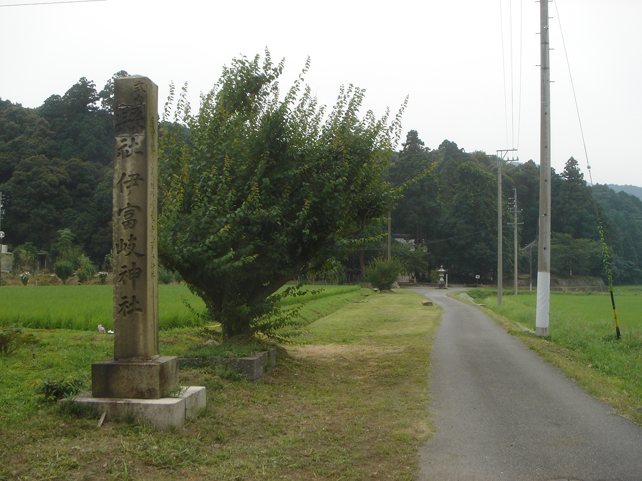 Ibuki Jinjya(Shrine)(伊富岐神社),Tarui,Gifu,Japan(岐阜県垂井町)で撮影